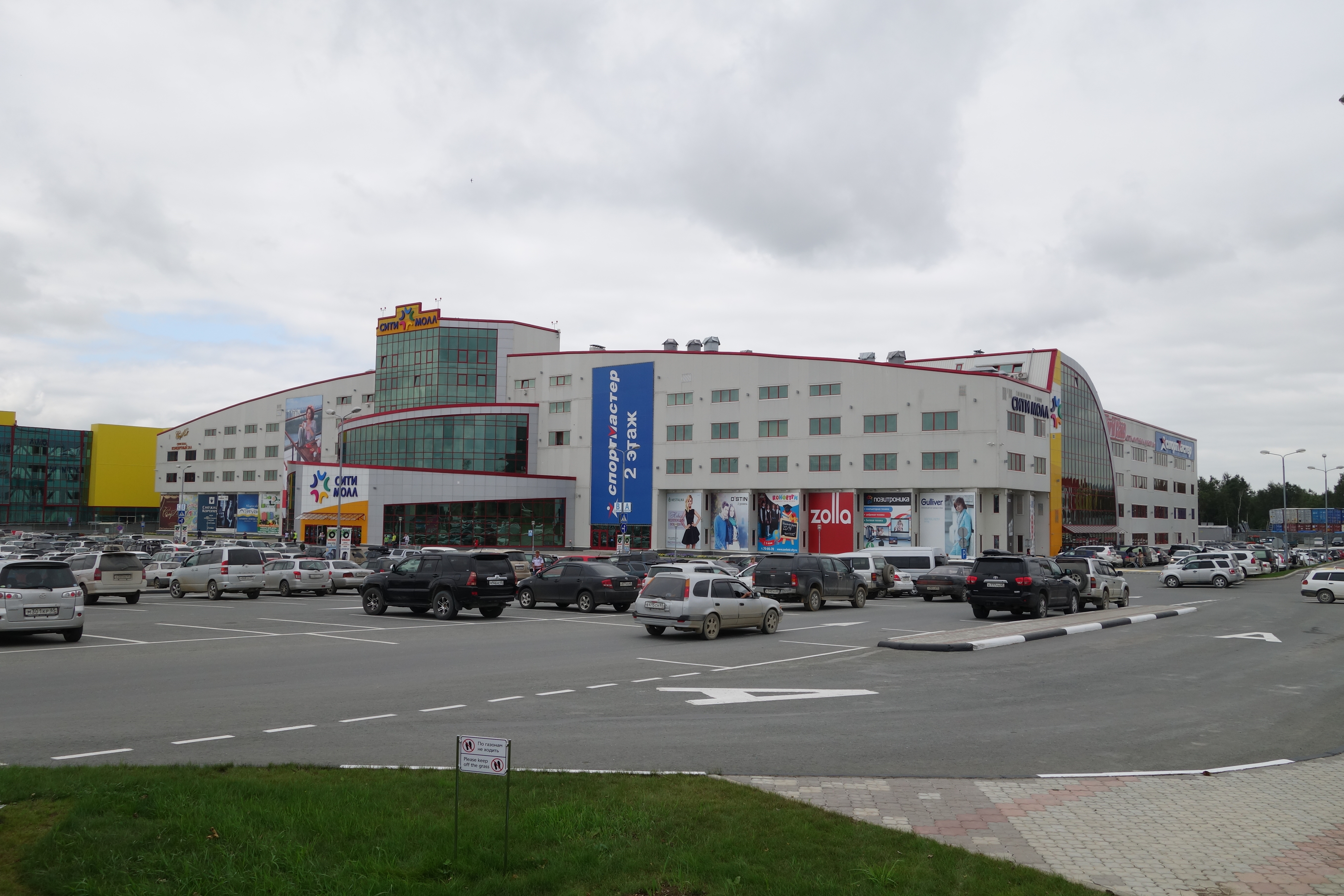 Сити-Молл. Южно-Сахалинск. Крупнейший торгово-развлекательный комплекс на Дальнем Востоке России. 2014 г.